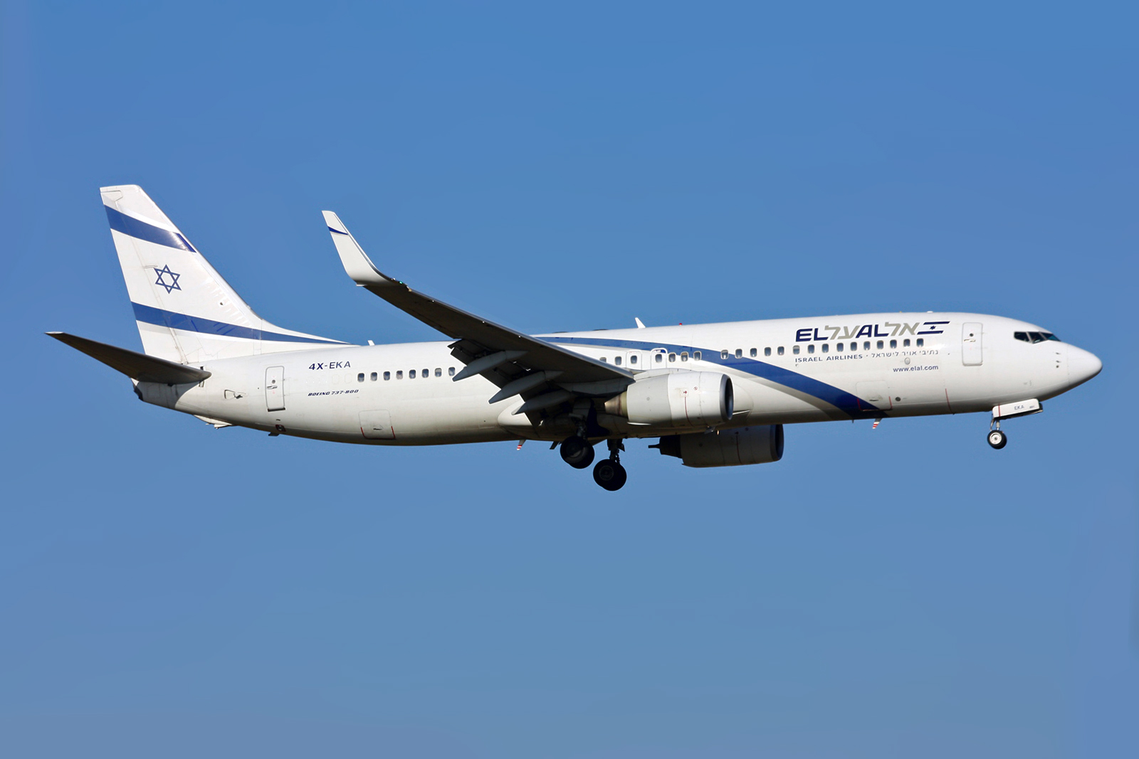 El Al Israel Airlines Boeing 737-858 4X-EKA at Zürich (- Kloten) (ZRH / LSZH) Switzerland 3.2012